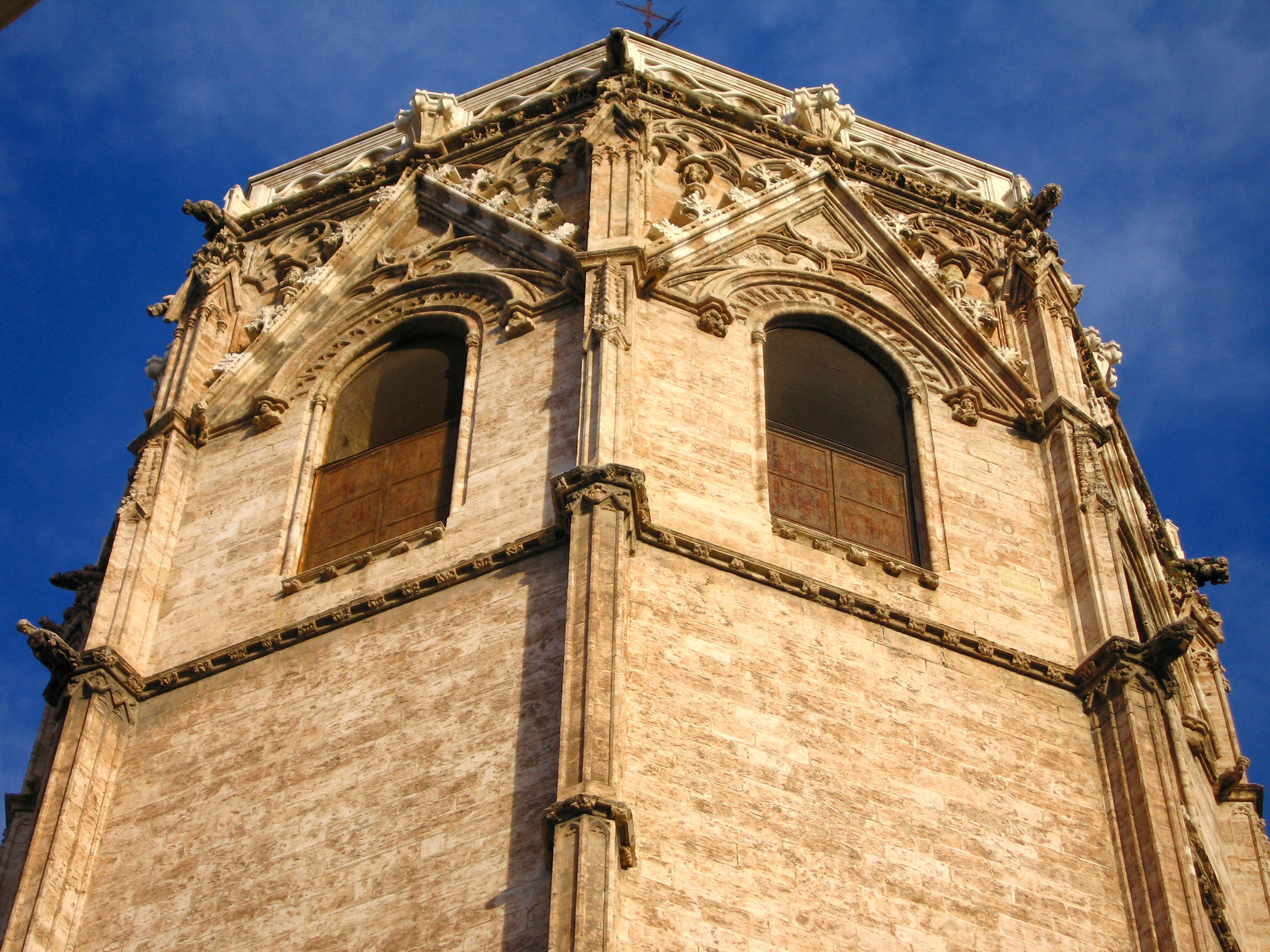 El Micalet (València)